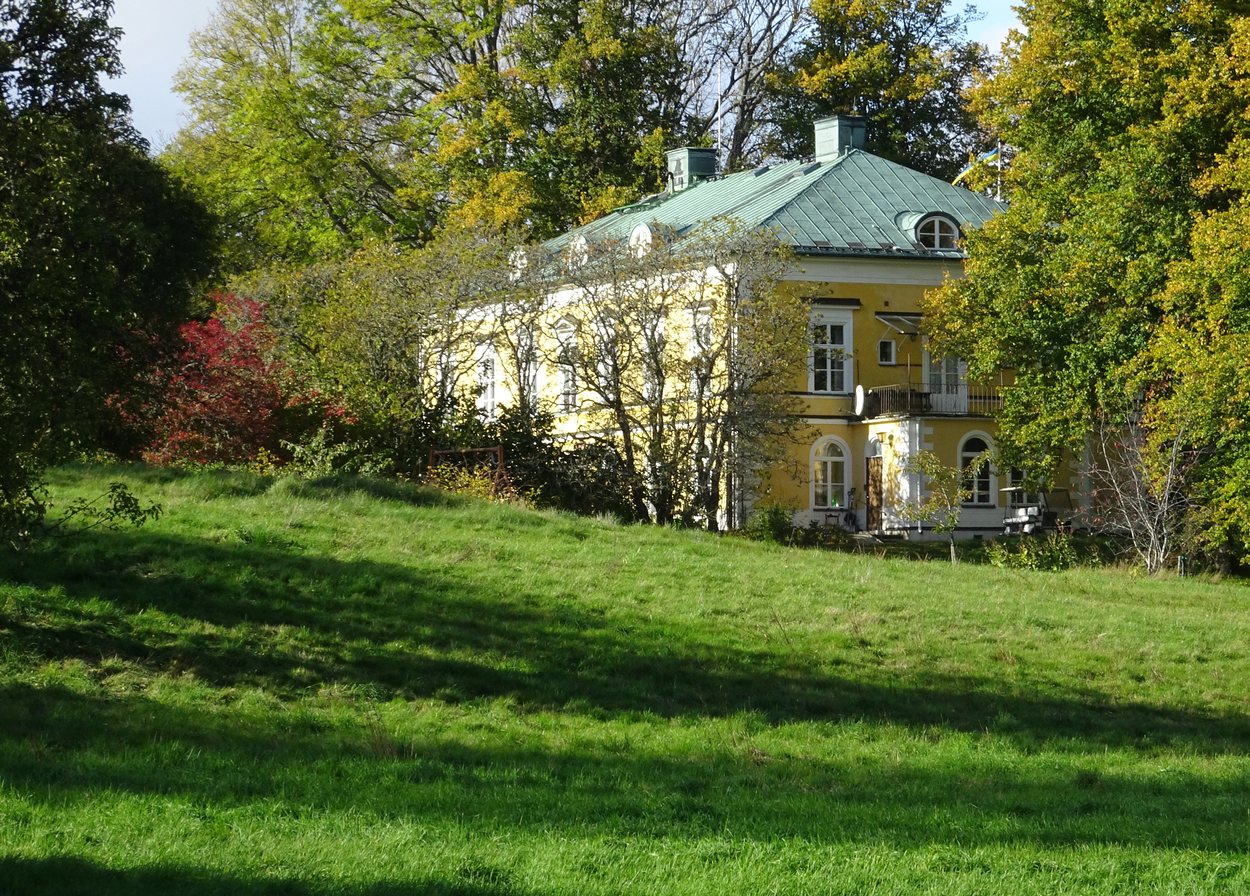 Nynäs gård huvudbyggnad, arkitekt Fredrik Blom